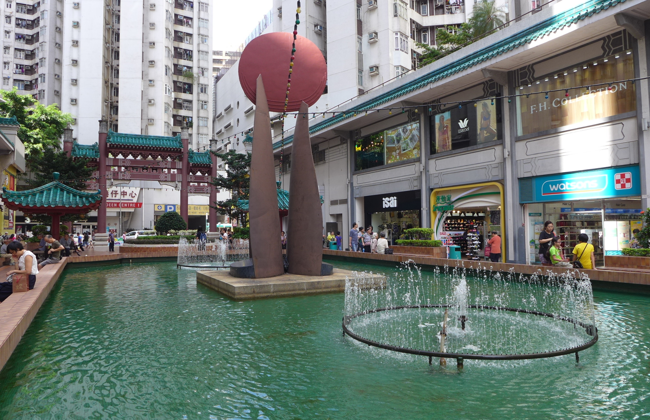 Aberdeen Centre Plaza Fountain